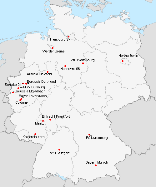 Répartition des clubs en 1.Bundesliga 2005-2006.